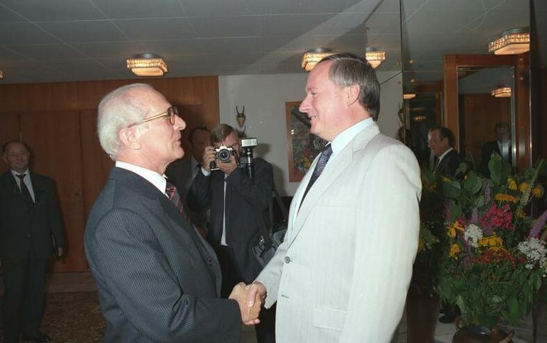 ADN-ZB/Franke/18.8.88/Berlin: Honecker/Lafontaine Der Generalsekretär des ZK der SED und Vorsitzende des Staatsrates der DDR, Erich Honecker, empfing im Jagdschloss Hubertusstock am Werbellinsee den Ministerpräsidenten des Saarlandes und stellvertretenden Vorsitzenden der SPD, Oskar Lafontaine, zu einem Gespräch.